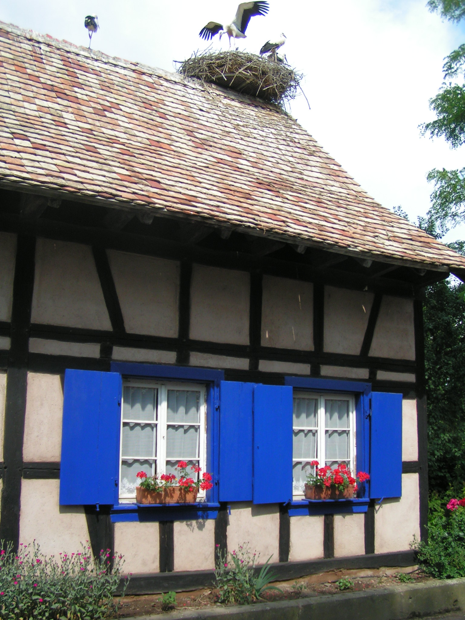 Störche auf einem Haus im Écomusée d'Alsace Ungersheim